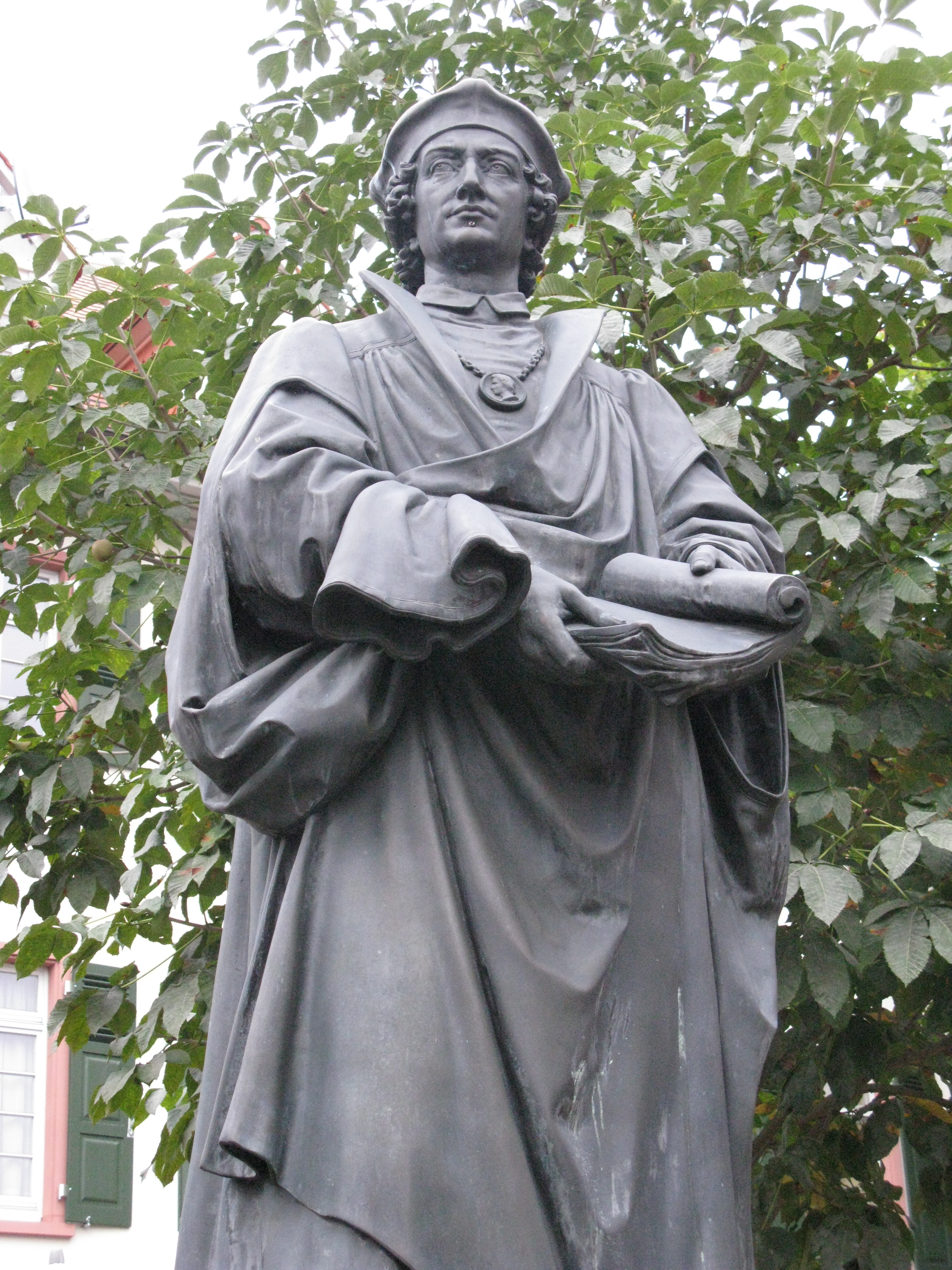 Denkmal Johannes Reuchlin vor der Schlosskirche Pforzheim